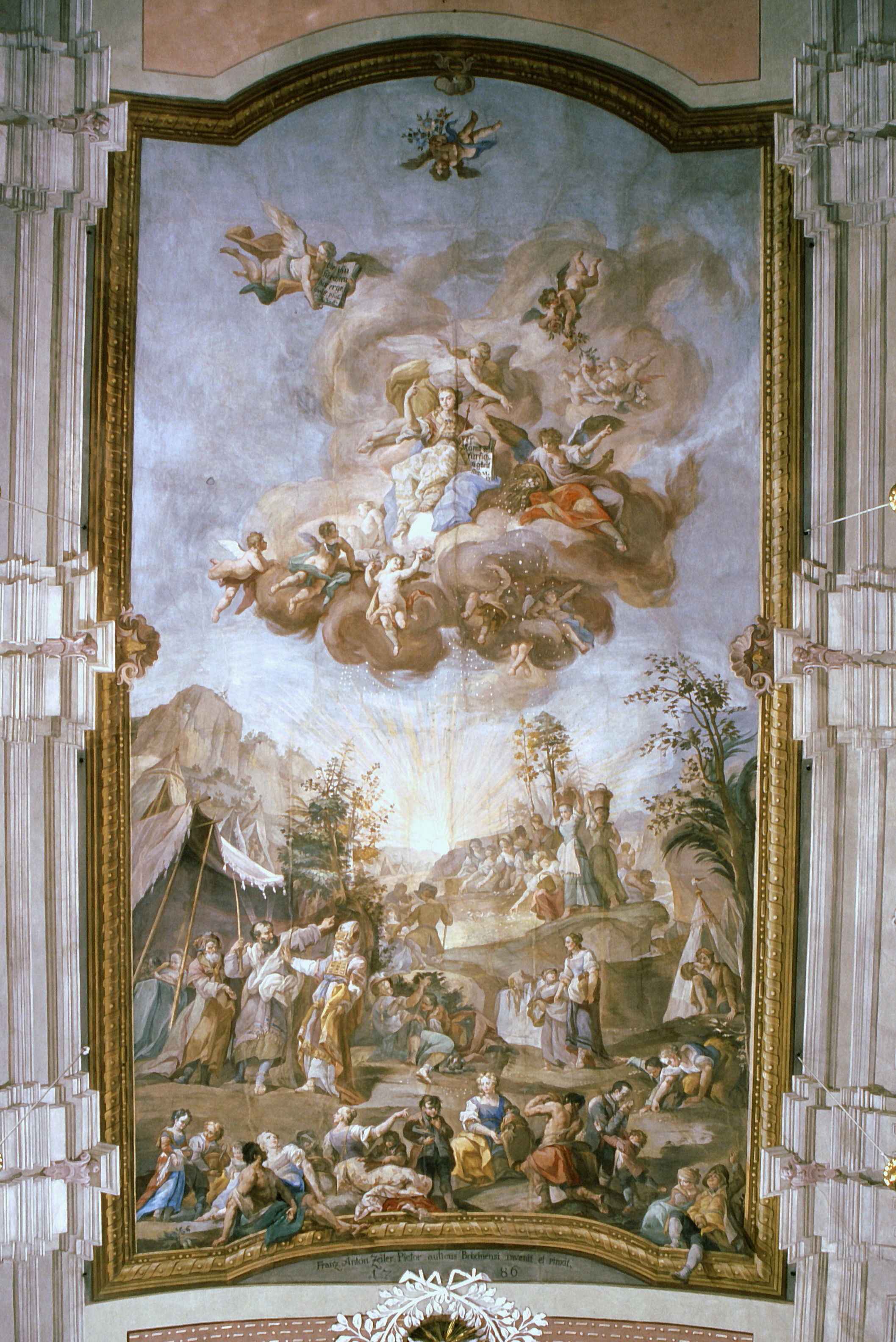 Deckenfresko (Mannalese) von Franz Anton Zeiller in der Kirche von Wängle, 1786